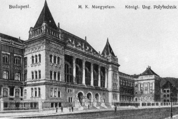 Királyi József Műegyetem (Budapest